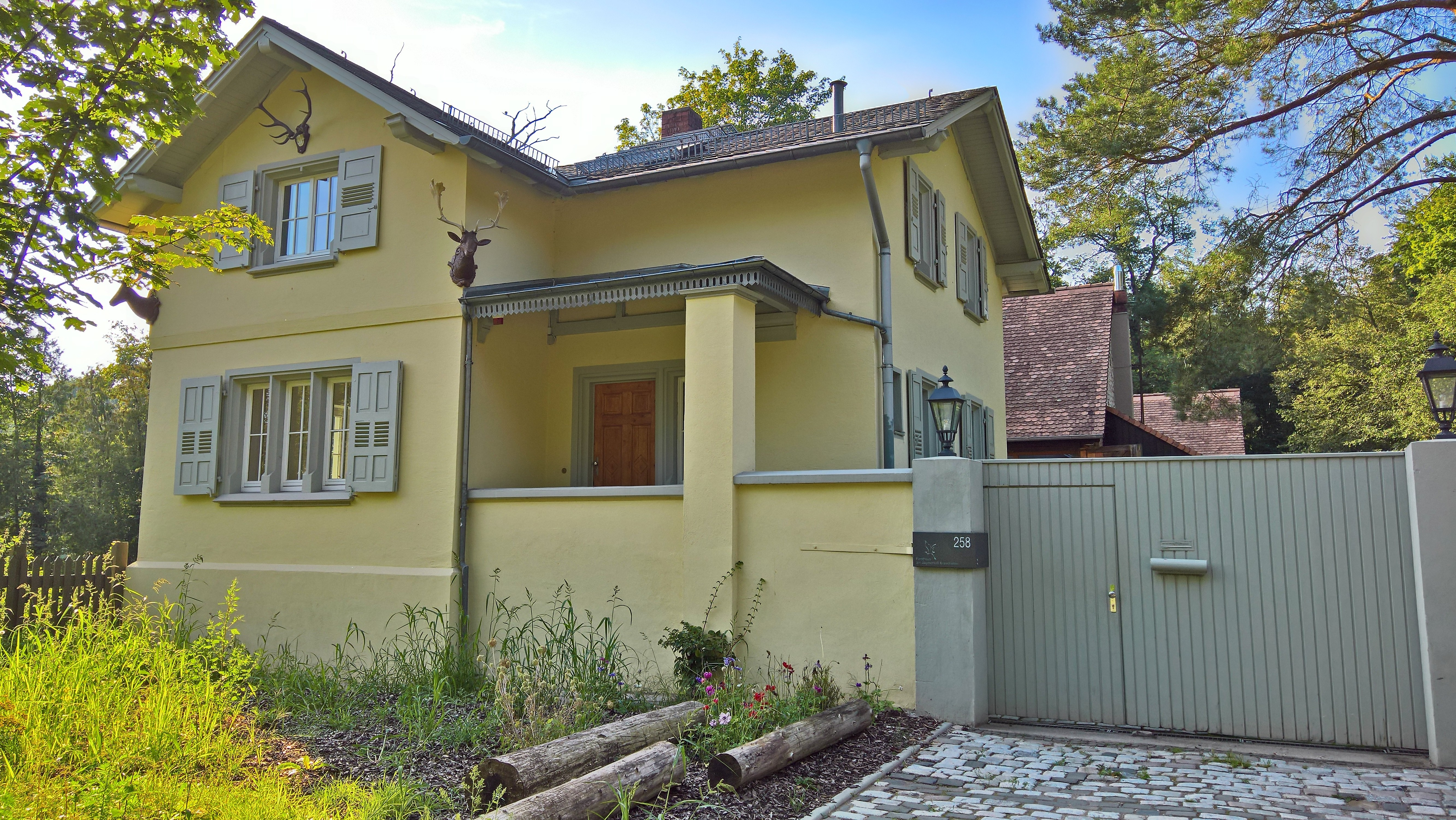 Das Forsthaus westlich des Kavaliersbaus des Jagdschlosses Kranichstein - Straßenansicht